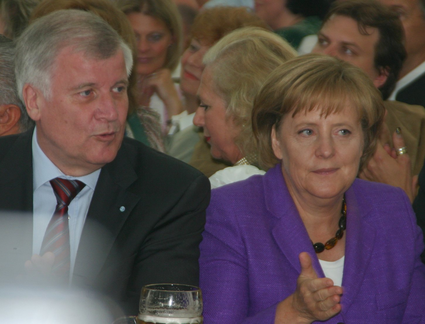 Bundeskanzlerin Angela Merkel (re.) mit dem Bundesminister für Ernährung, Landwirtschaft und Verbraucherschutz Horst Seehofer auf dem CSU-Europatag 2008 (1. Juni 2008) Titel des Werks: "Angela Merkel mit Horst Seehofer (2008)".